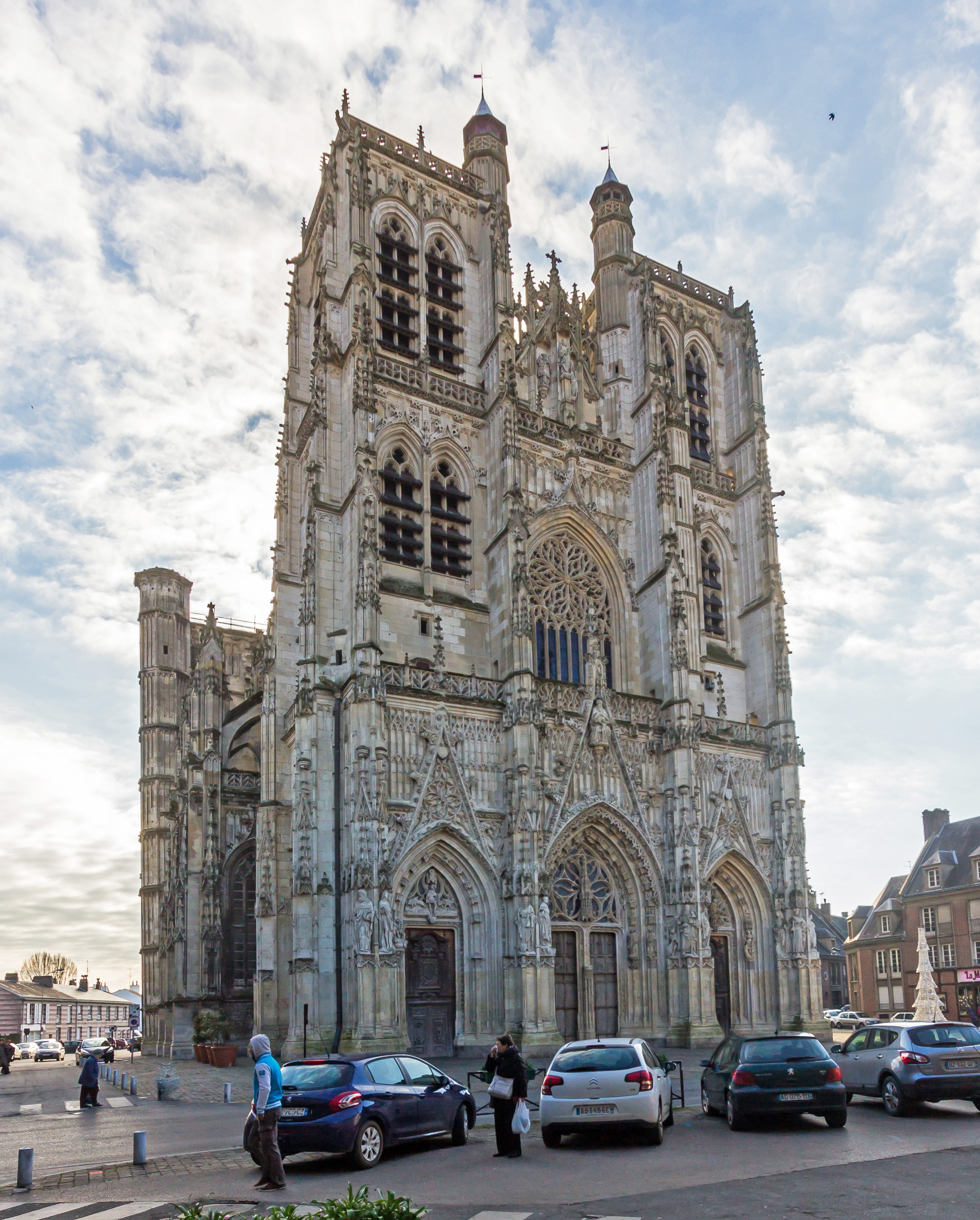 Église Saint-Vulfran d'Abbeville